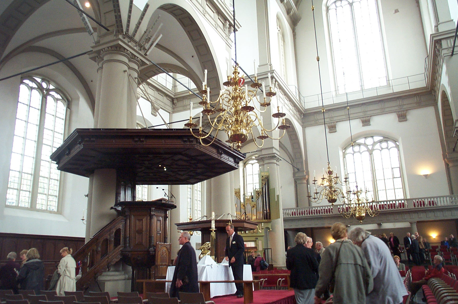 Westerkerk, Amsterdam, after a Sunday morning service.